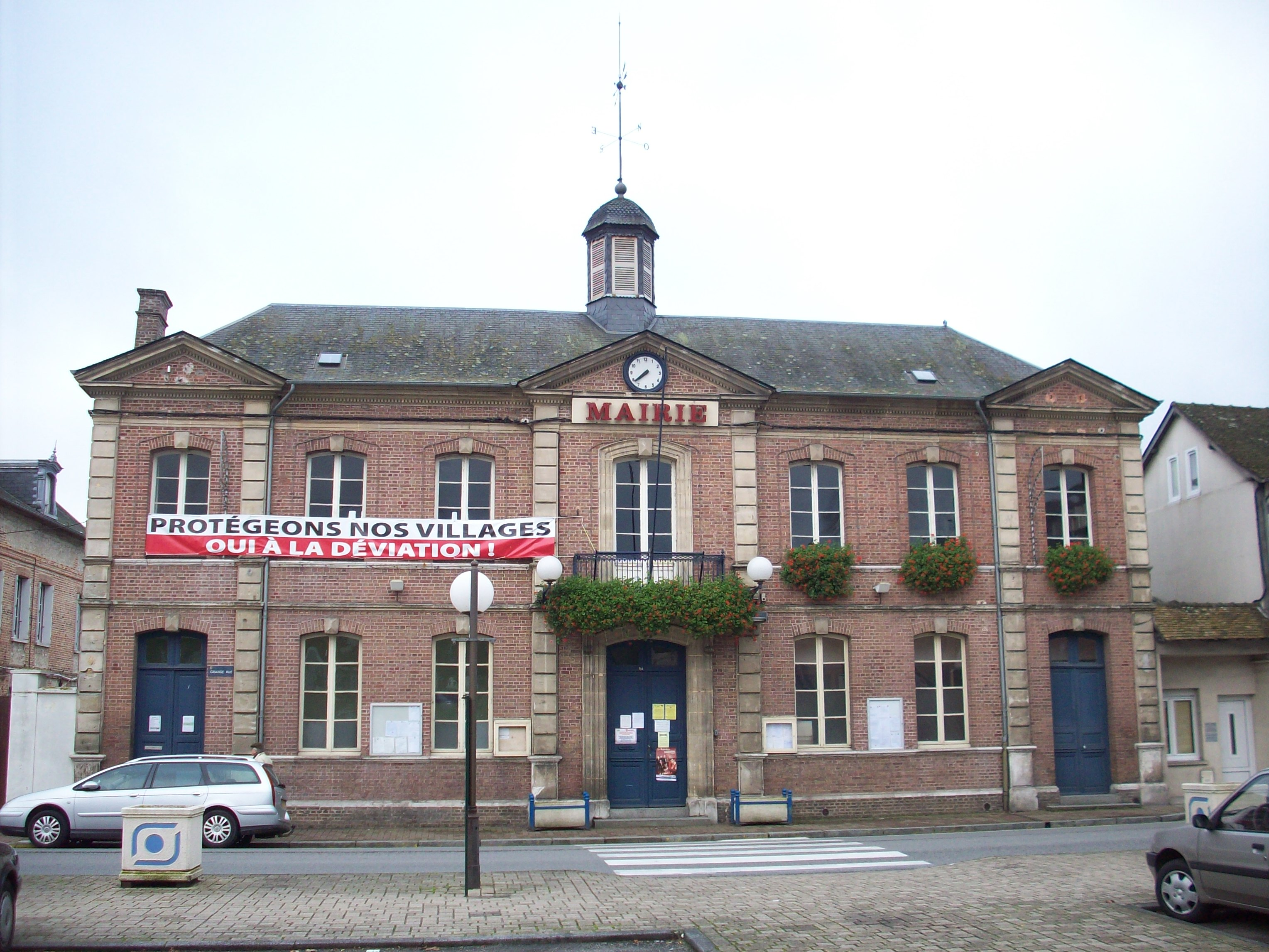 Mairie de Pont-Saint-Pierre.